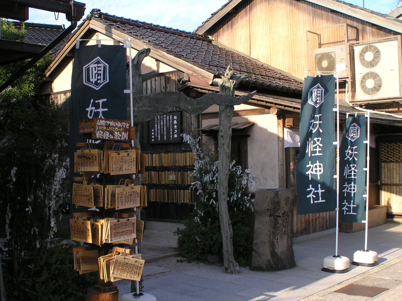 境港水木ロード妖怪神社 ～photo by Autumn Snake 【おぉたむすねィく探検隊】